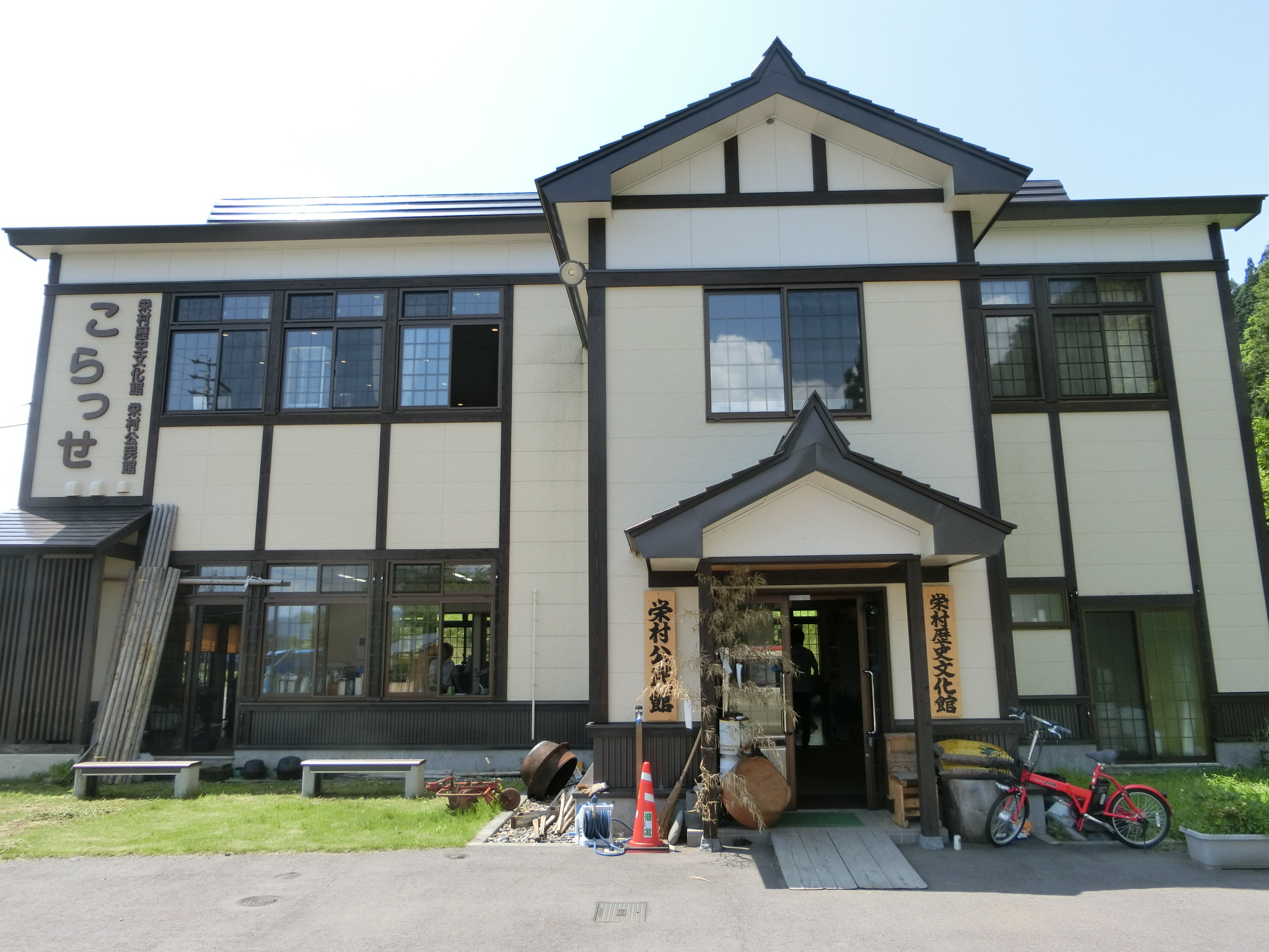 栄村公民館